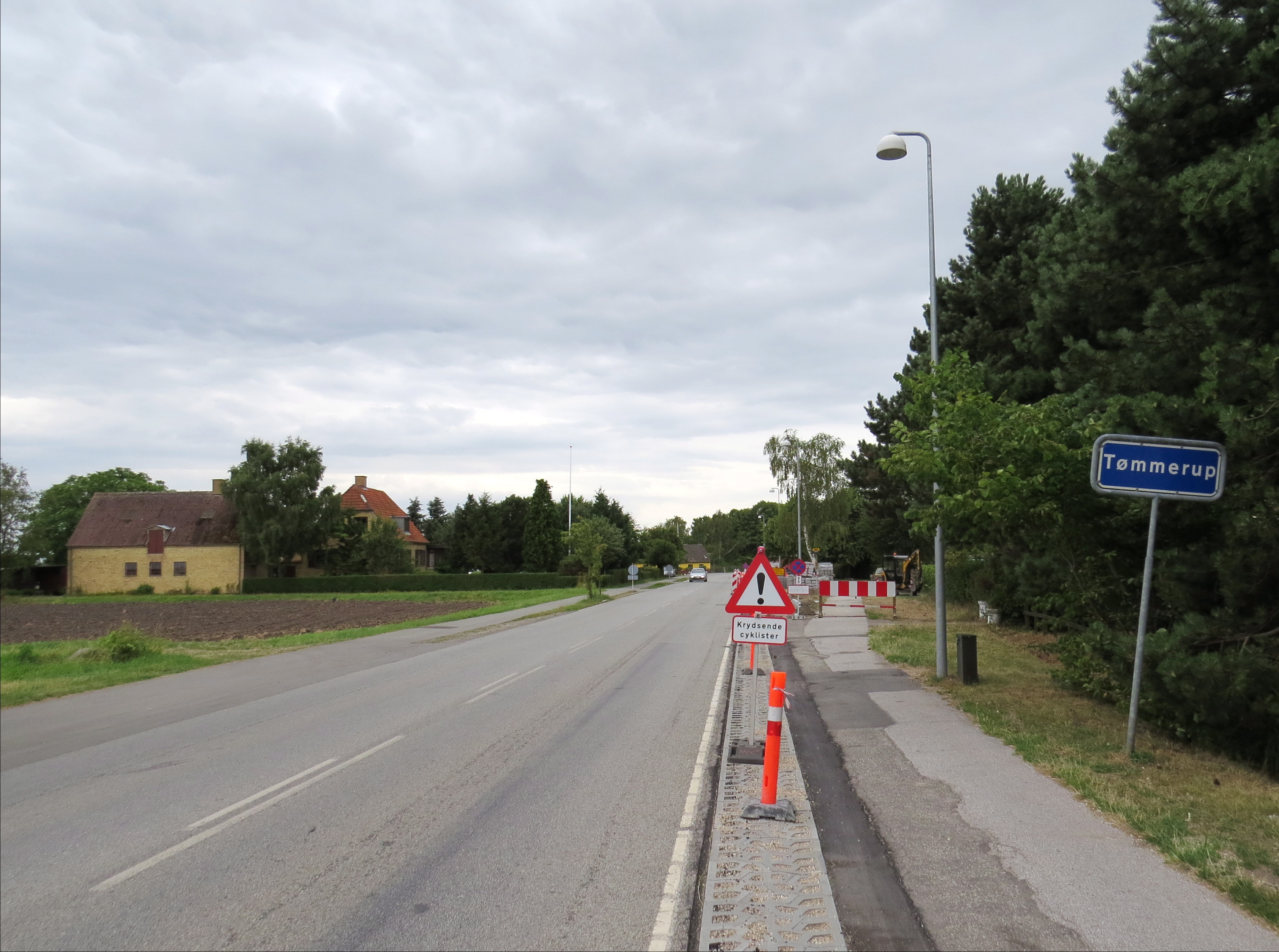 Tømmerup på Amager